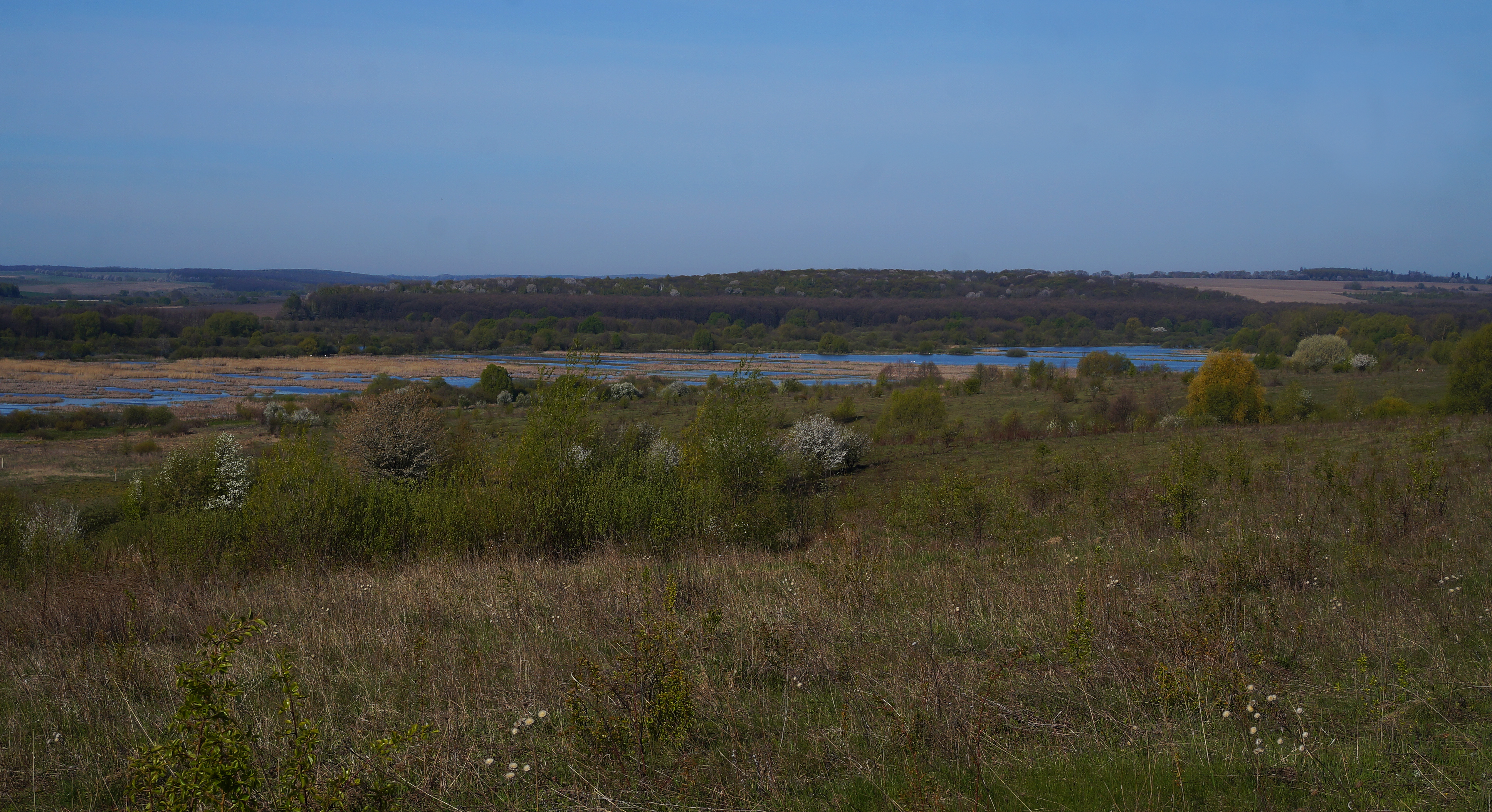 Шиїнський заказник, Деражнянський район, заплава р. Ровець між с. Явтухи, Слобідка Шелехівська